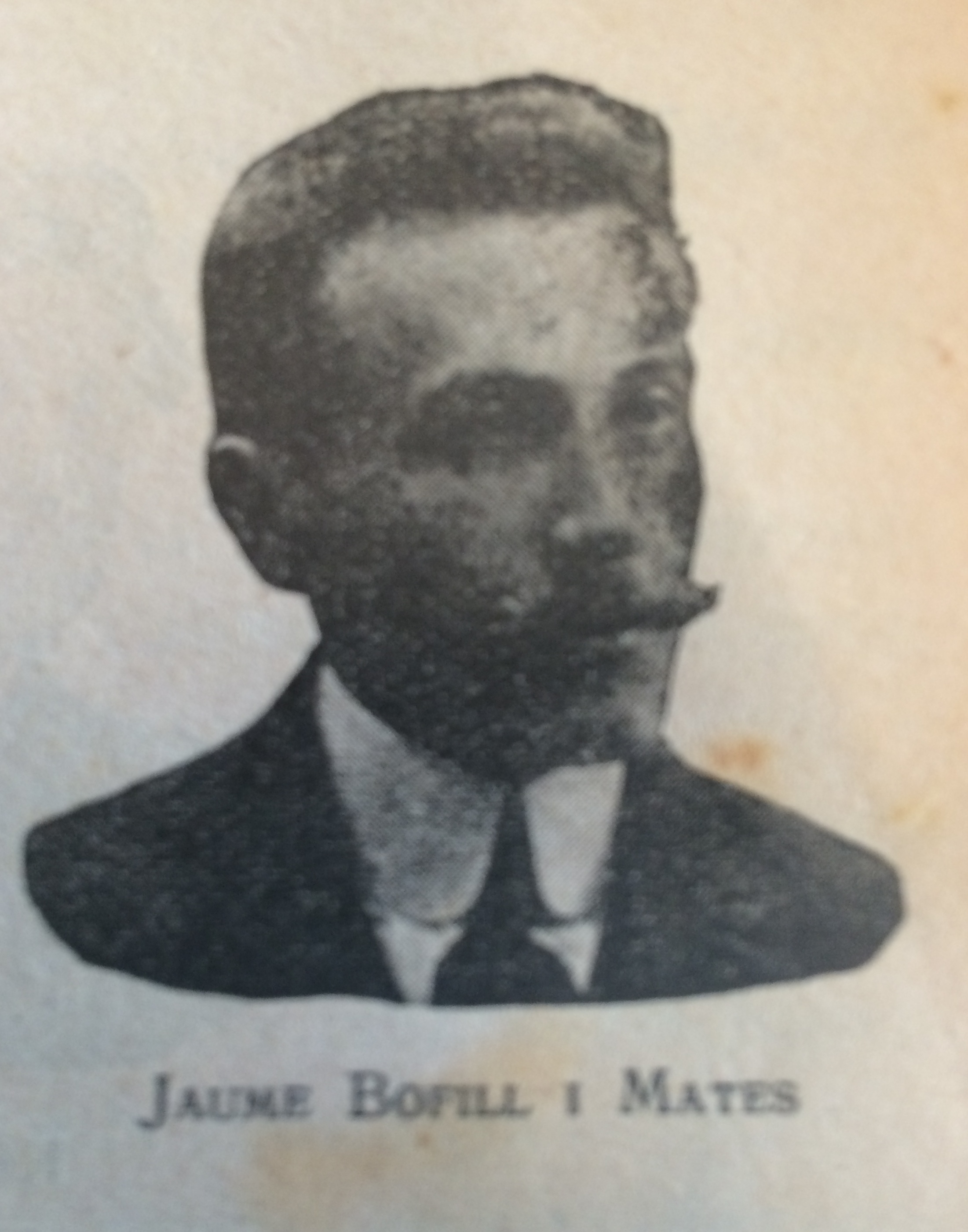 Guerau de Liost és el nom de ploma de Jaume Bofill i Mates (Olot, Garrotxa, 30 d'agost de 1878 - Barcelona, 2 d'abril de 1933) fou escriptor, poeta noucentista i polític català.